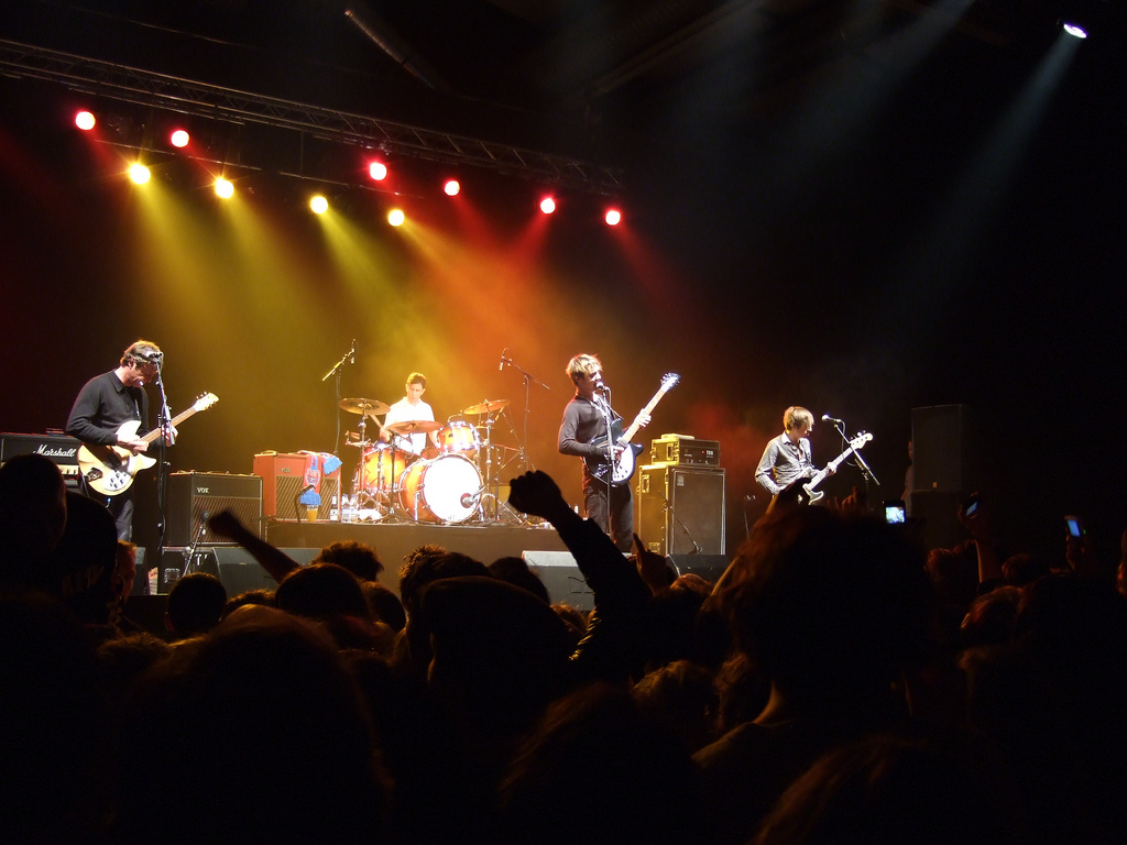 Babyshambles.